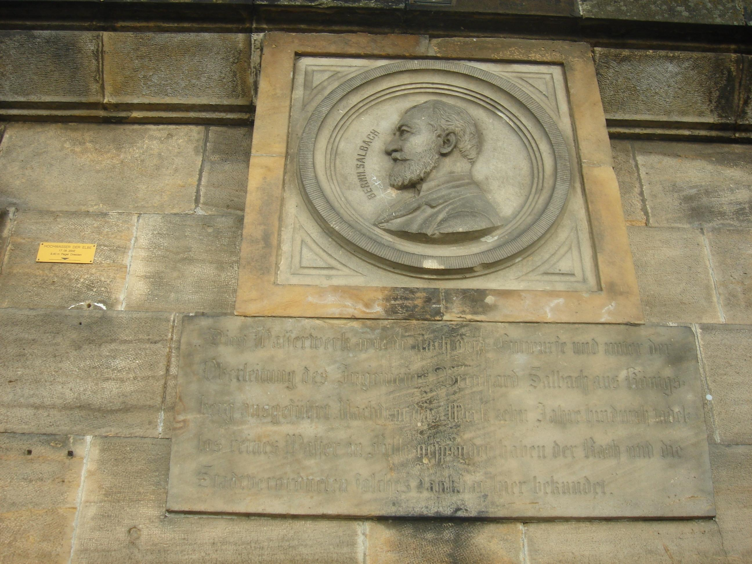 Gedenktafel am Wasserwerk Saloppe in Dresden für den bauleitenden Ingenieur Bernhard Salbach mit dessen Relief, Text: "Dies Wasserwerk wurde nach dem Entwurfe und unter der Oberleitung des Ingenieurs Bernhard Salbach aus Königsberg ausgeführt. Nachdem das Werk zehn Jahre hindurch tadellos reines Wasser in Fülle gespendet, haben der Rath und die Stadtverordneten solches dankbar hier bekundet." Links außerdem eine Hochwassermarke mit dem Pegelstand 9,40 Meter des Elbehochwassers vom 17. August 2002.